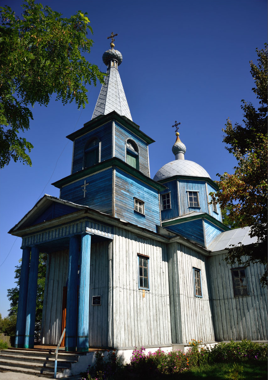 Храм Святого Архистратига Михаїла